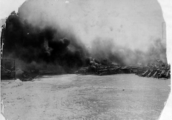 Photos montrant le feu en train de traverser la rivière des Outaouais (1900).